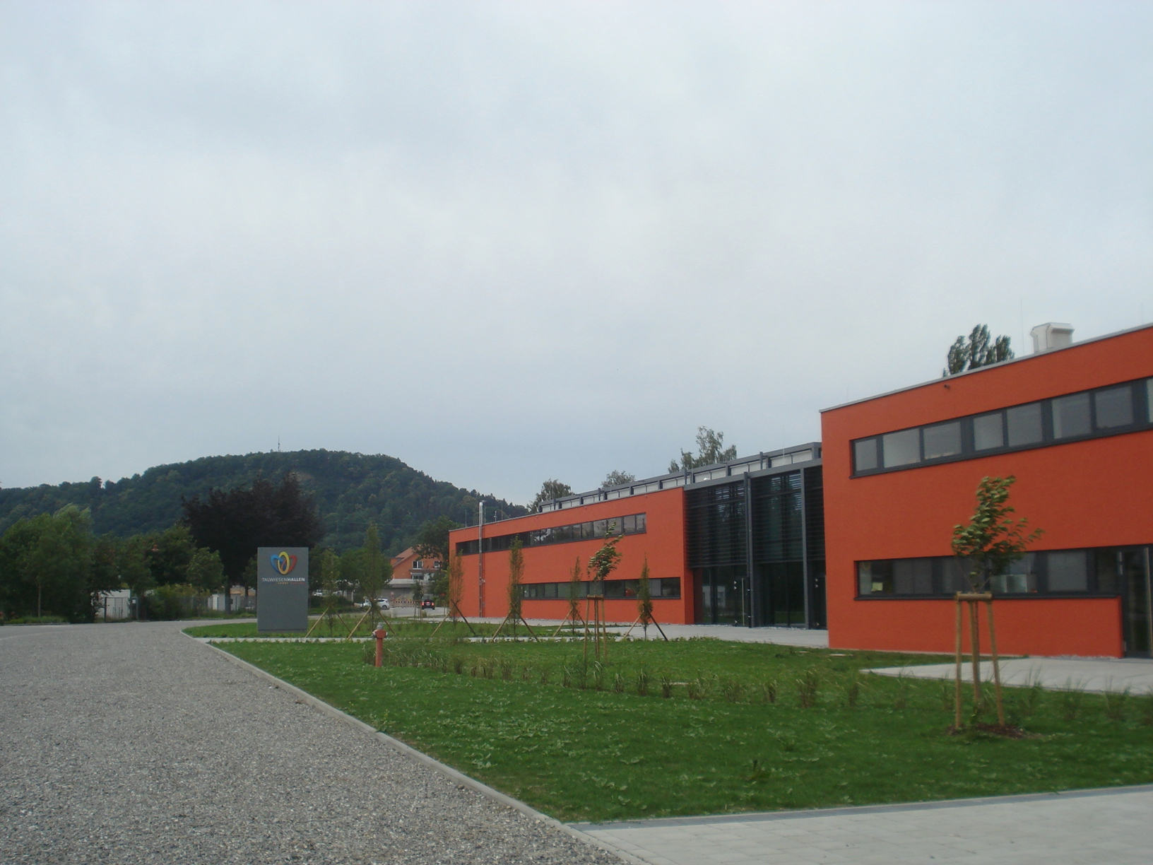 Einweihung 2012, im Hintergrund der Hausberg Rosenegg